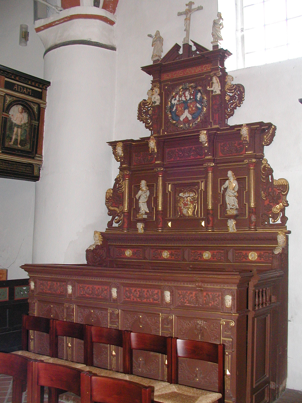 Der Predigtstuhl vom Bildschnitzer Jürgen Heydtmann